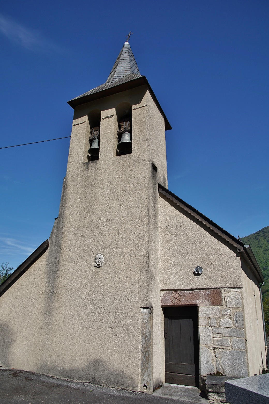 Haute Garonne